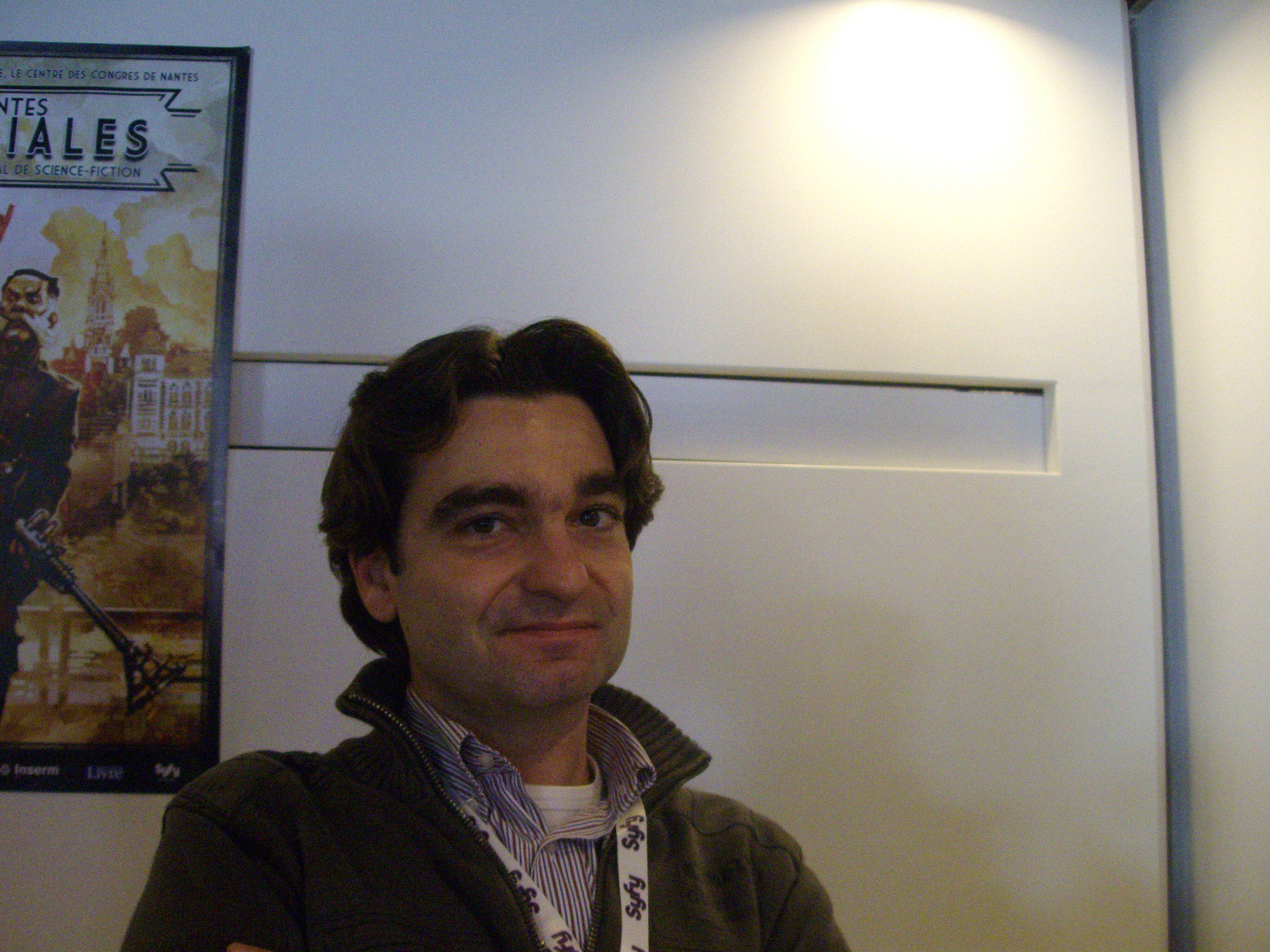 Ugo Bellagamba aux Utopiales 2011